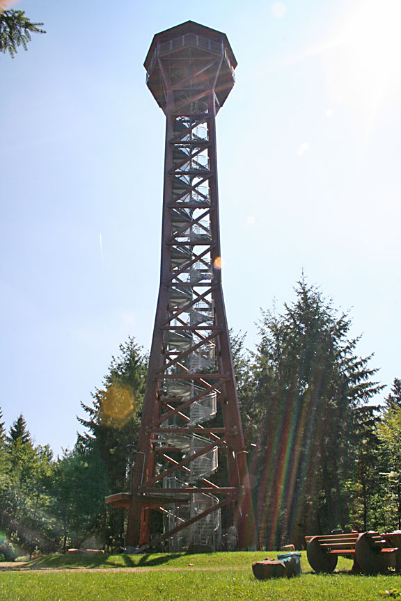 Teltschikturm Wilhelmfsfeld